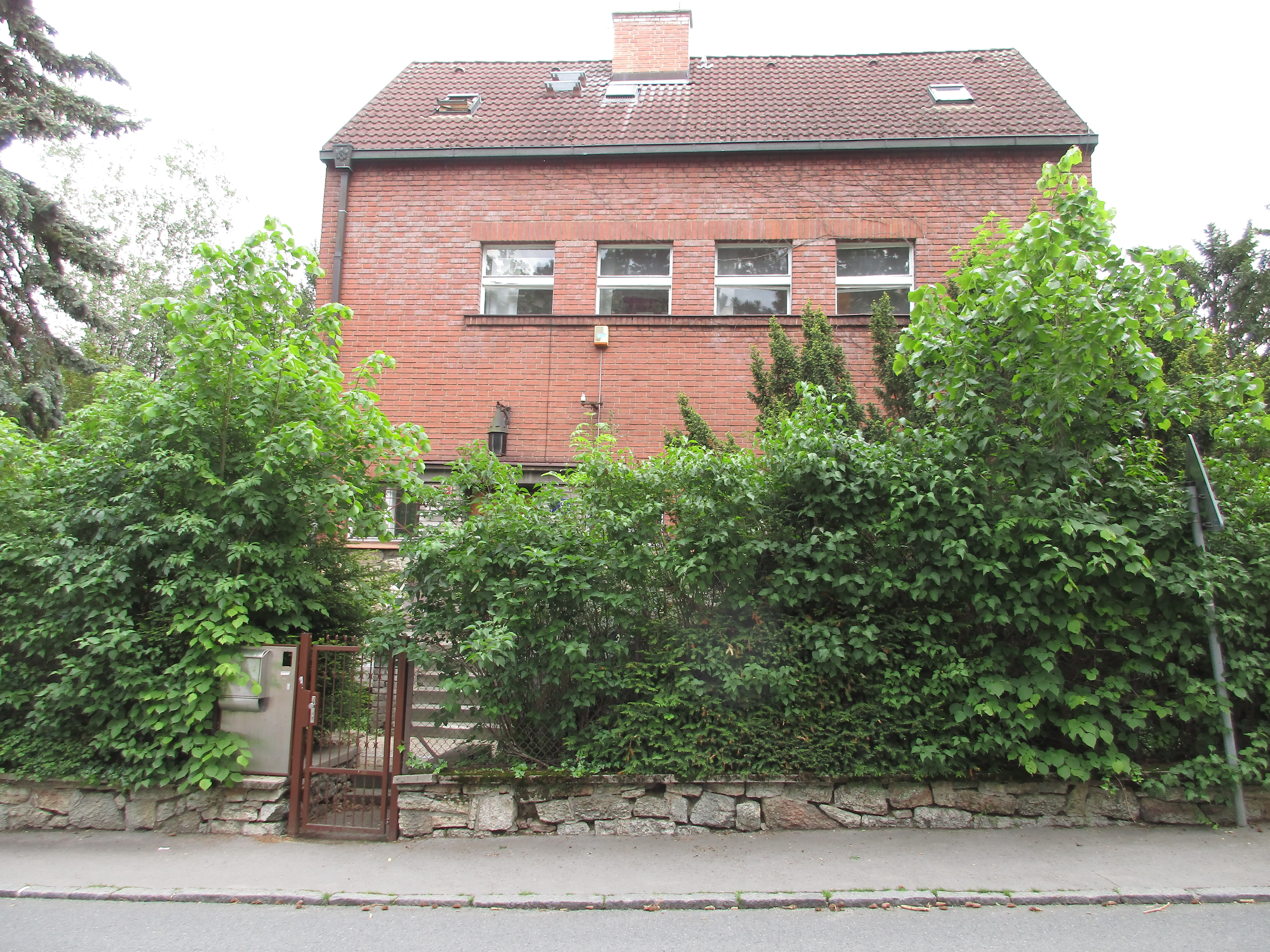 Filmařská 336/3, Praha 5-Hlubočepy